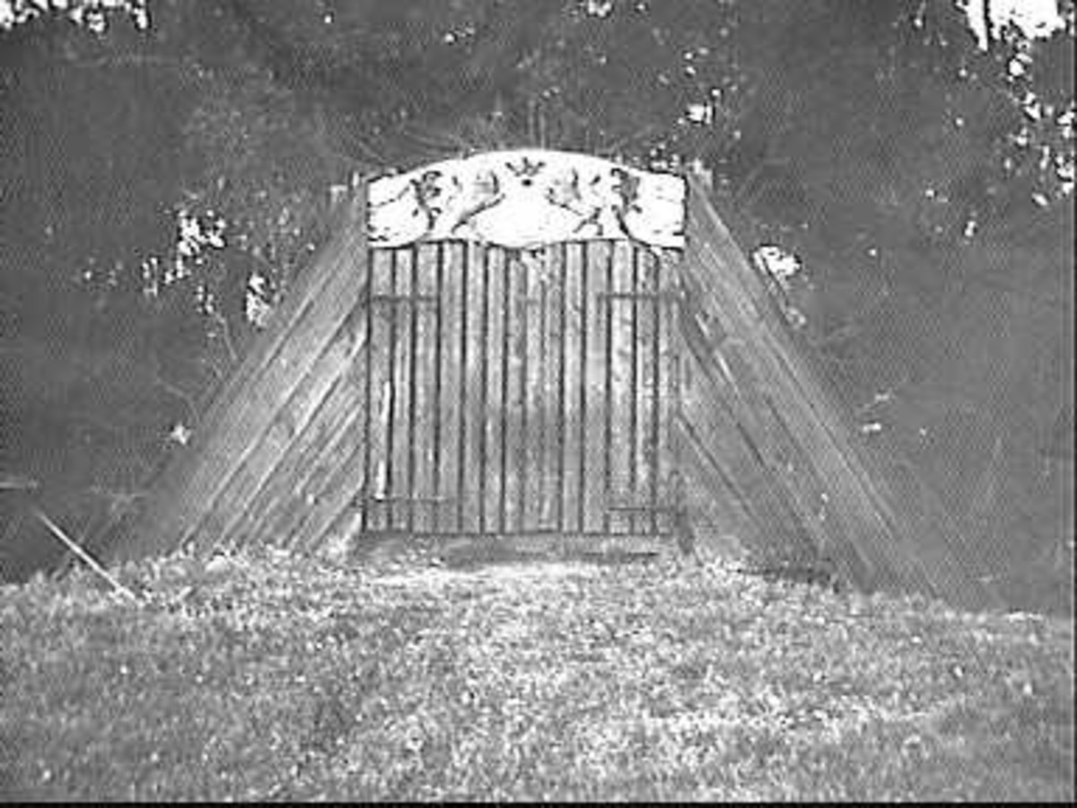 Wieringen/ Inrijhek: ingangshek van een eendenkooi BRANDTS BUYS ZUIDH.F 12/3 (opmerking: Deze afbeelding hebben wij helaas alleen in deze lage resolutie.)